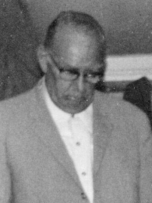 Friedrich A. Stock, 1968 in Merzhausen.